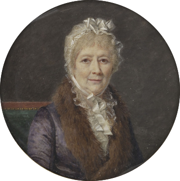 Portrait de Madame Martin de Lesseps